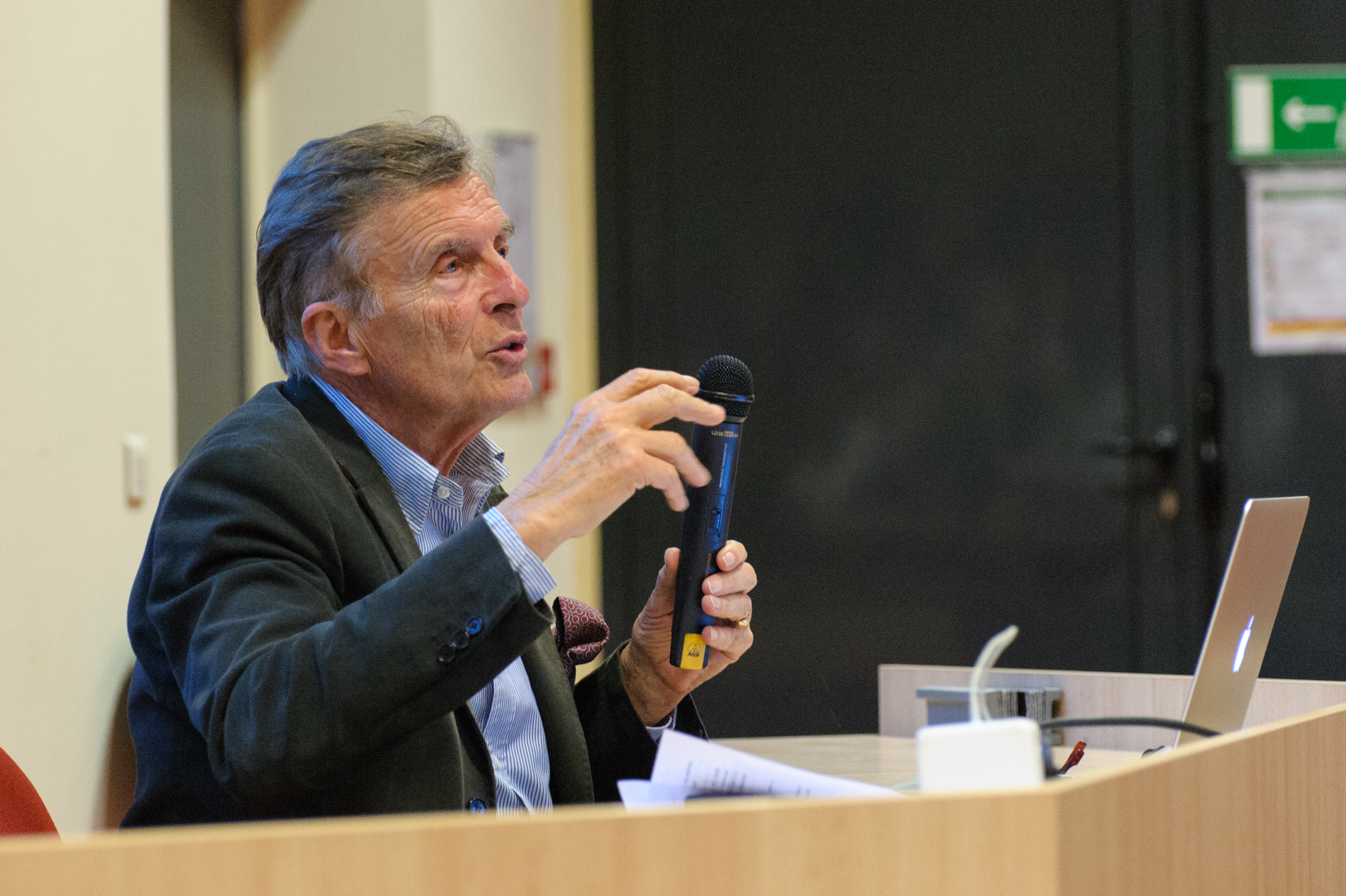 Le professeur Alain-Michel Boudet, à Toulouse, en février 2017